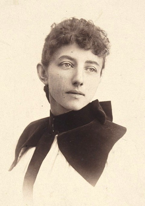 fotoportret